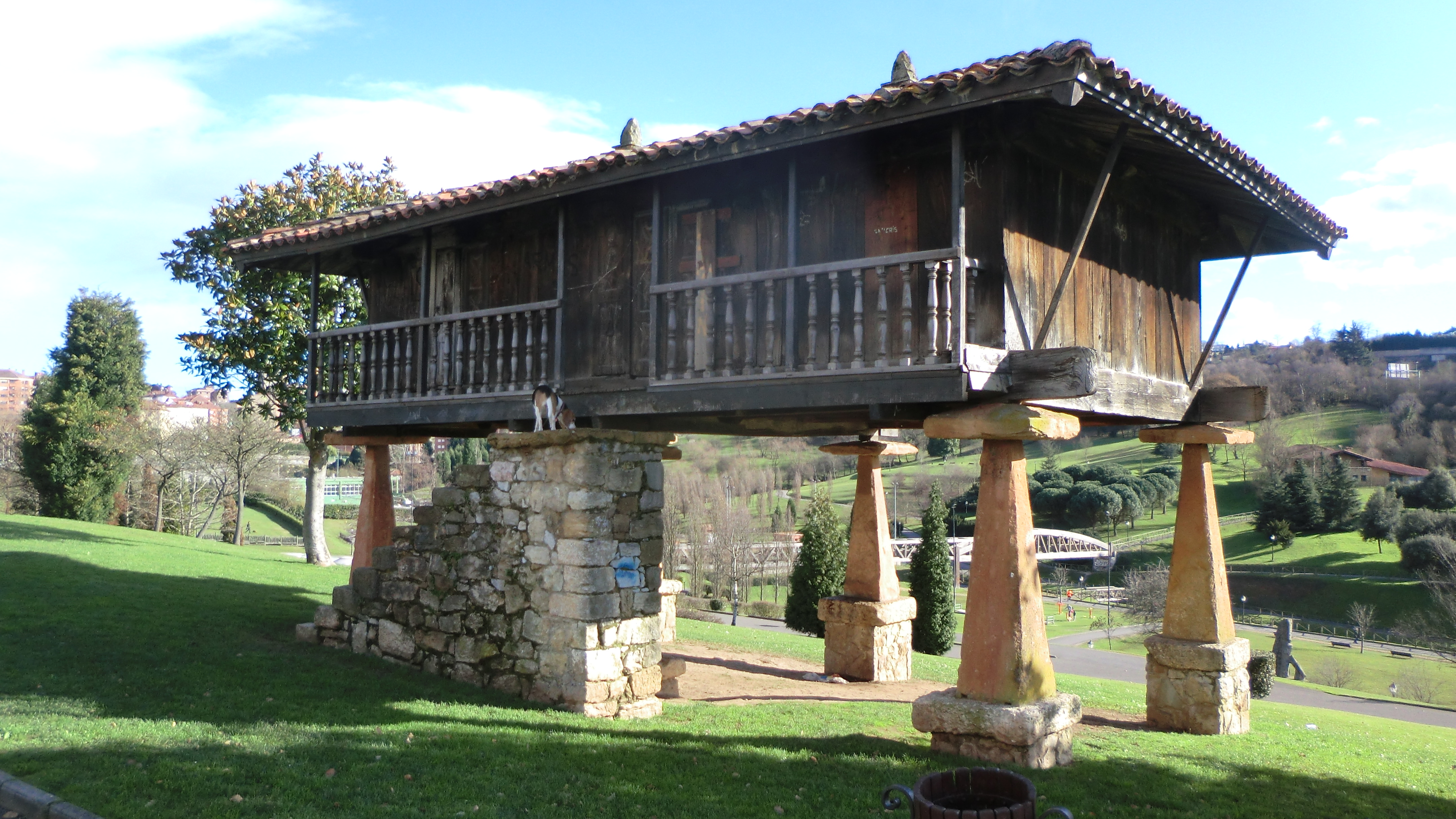 astuarianisches bauerhaus